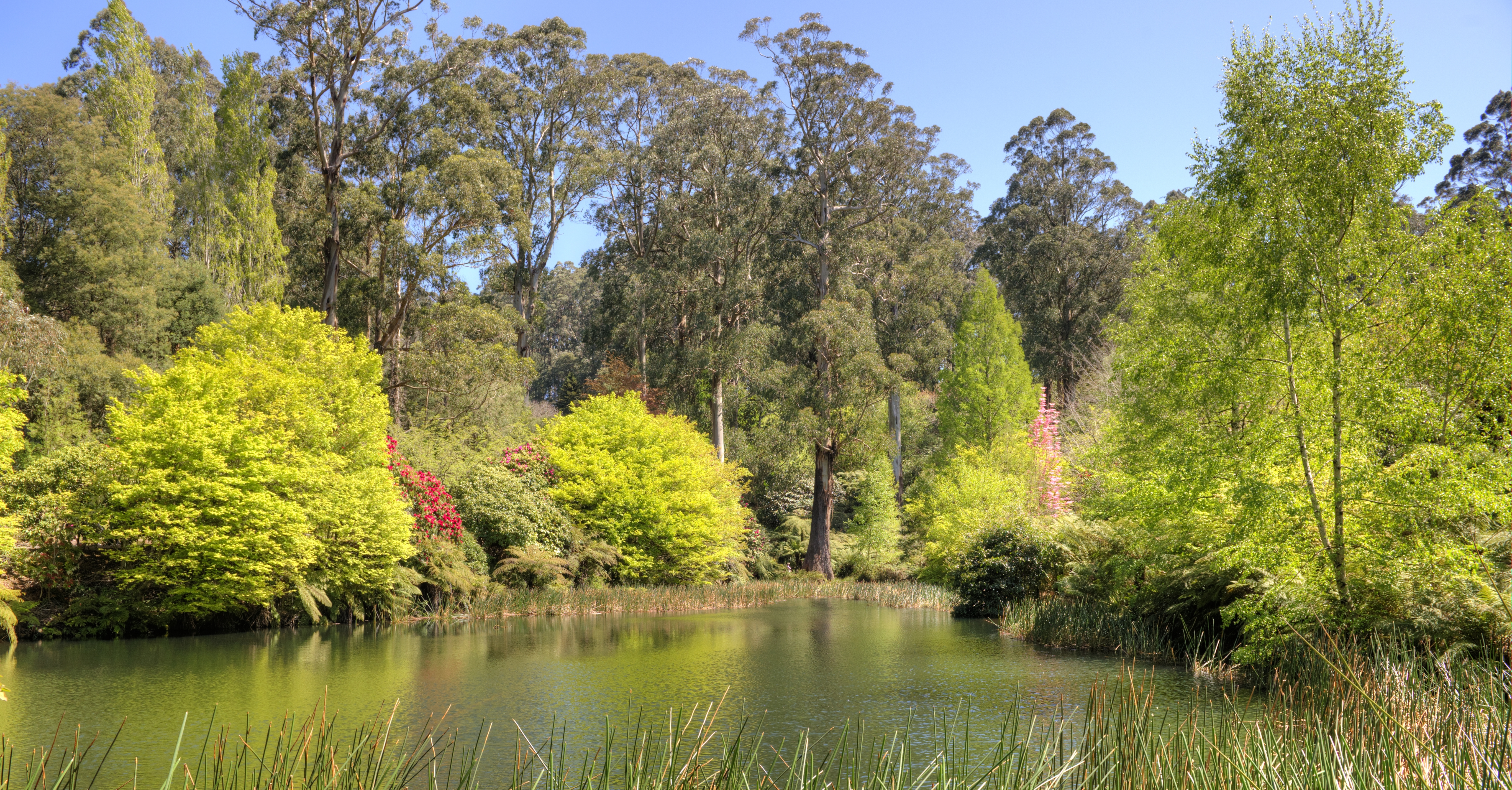 National Rhododendron Garden